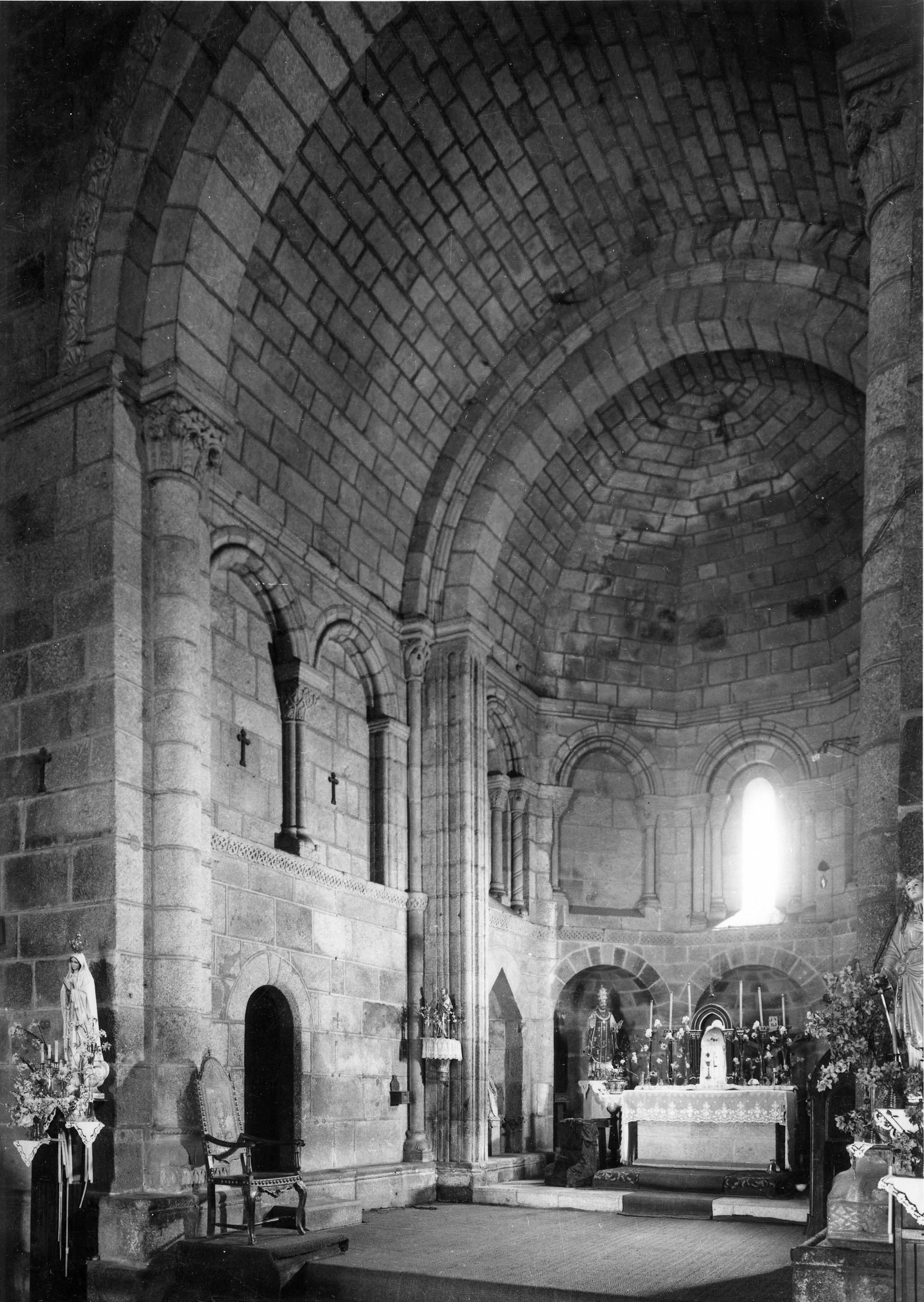 Capela-mor. Fotógrafo: Mário Novais, 1899-1967. Orientador científico: Mário Tavares Chicó, 1905-1966. Data aproximada da produção da fotografia original: 1954. [CFT015.277.ic]